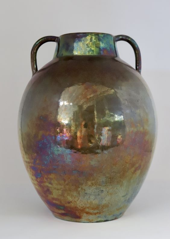 Riccardo Gatti e Gio Ponti - Vaso di forma ovoidale, con due manici applicati, modellato al tornio, in terracotta smaltata con lustri a riflessi metallici. Altezza cm 31. Esposizioni: VI triennale d'arte di Milano. Epoca d’esecuzione: anni ’30 del XX secolo. Firma dell'autore "R.Gatti - Faenza" nell'incavo della base. Collezione A.F.R. Brescia